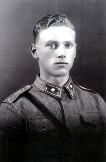 Lauri Törni. Kuva on viranomaisten ottama sotilaspassikuva hänen valmistuttuaan kadettikoulusta.